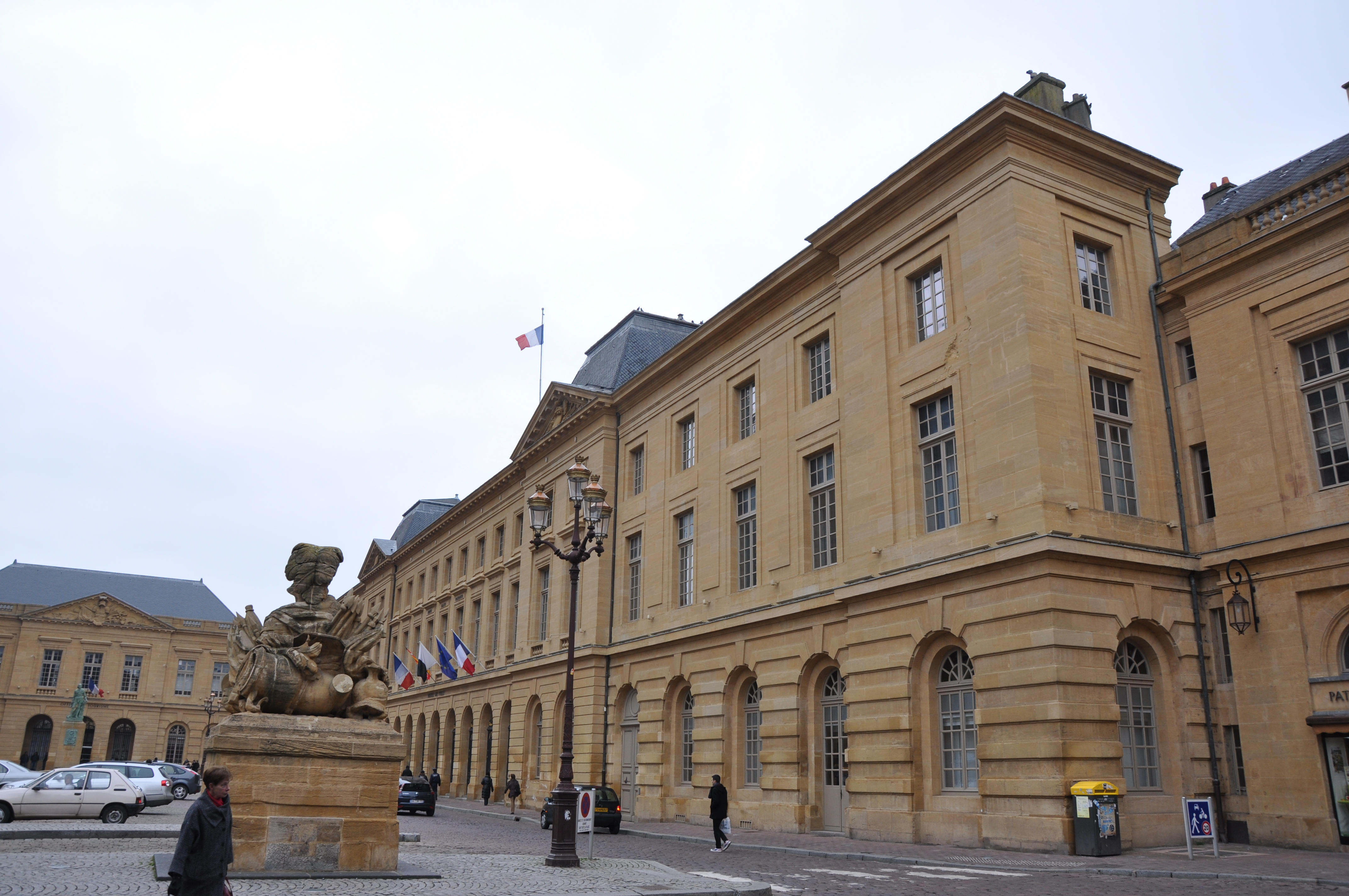 Mairie de Metz, Metz, Lorraine, France